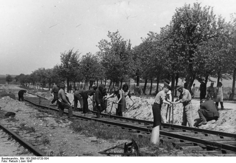 Rostock, Straßenbahnbau Straßenbau in Rostock. Völlig aus eigenen Mitteln wurde 1947 in Rostock mit dem Bau einer neuen Strassenbahnlinie für die Außenbezirke begonnen. Teilweise mit unzureichenden Mitteln begonnen, sind jetzt bereits 3 km neuer Strecke fertiggestellt. Dank der Erweiterung beförderte die Rostocker Straßenbahn 1947 insgesamt 30 Millionen Fahrgäste. U.B.z. Gleisarbeiten an der neuen Strecke (Juni 1947) Aufn.: Illus-Pietsch 1805-48